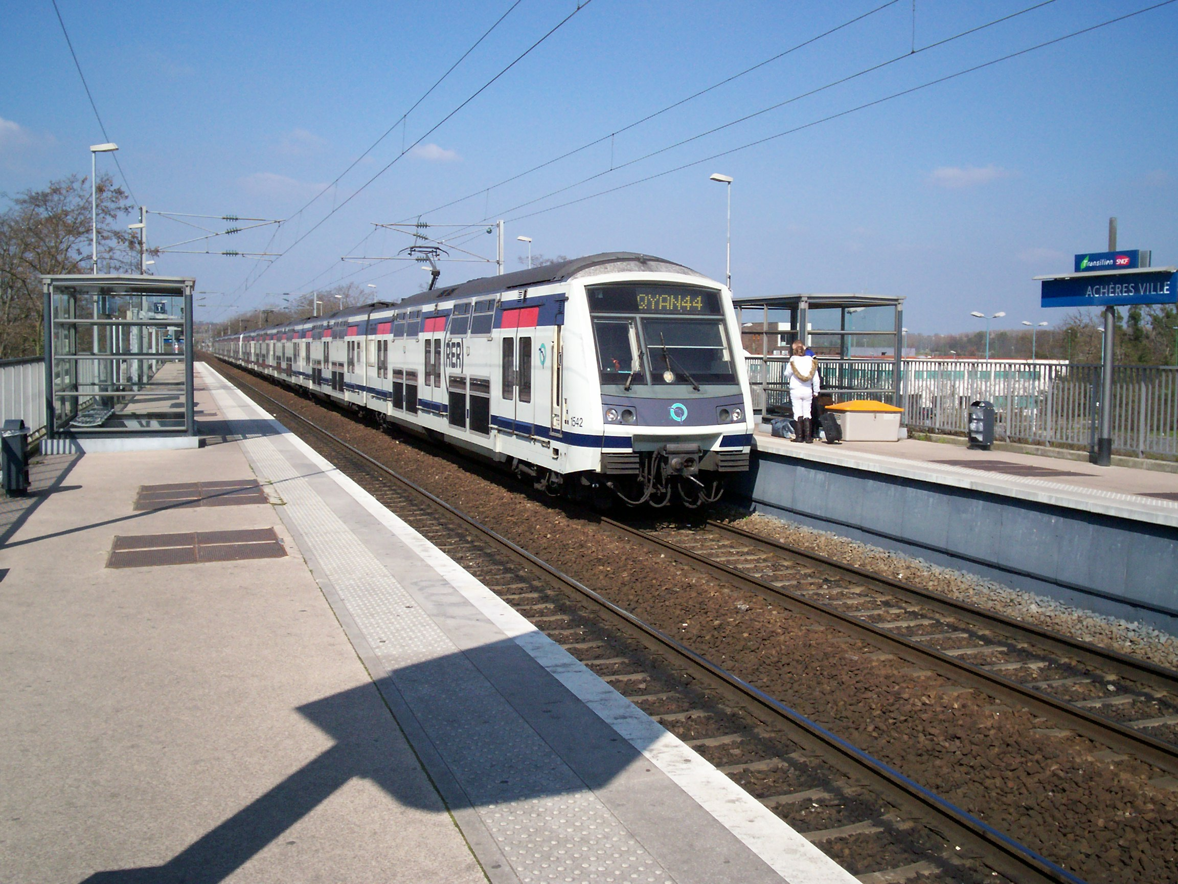 MI 2N - Gare d'Achères-Ville